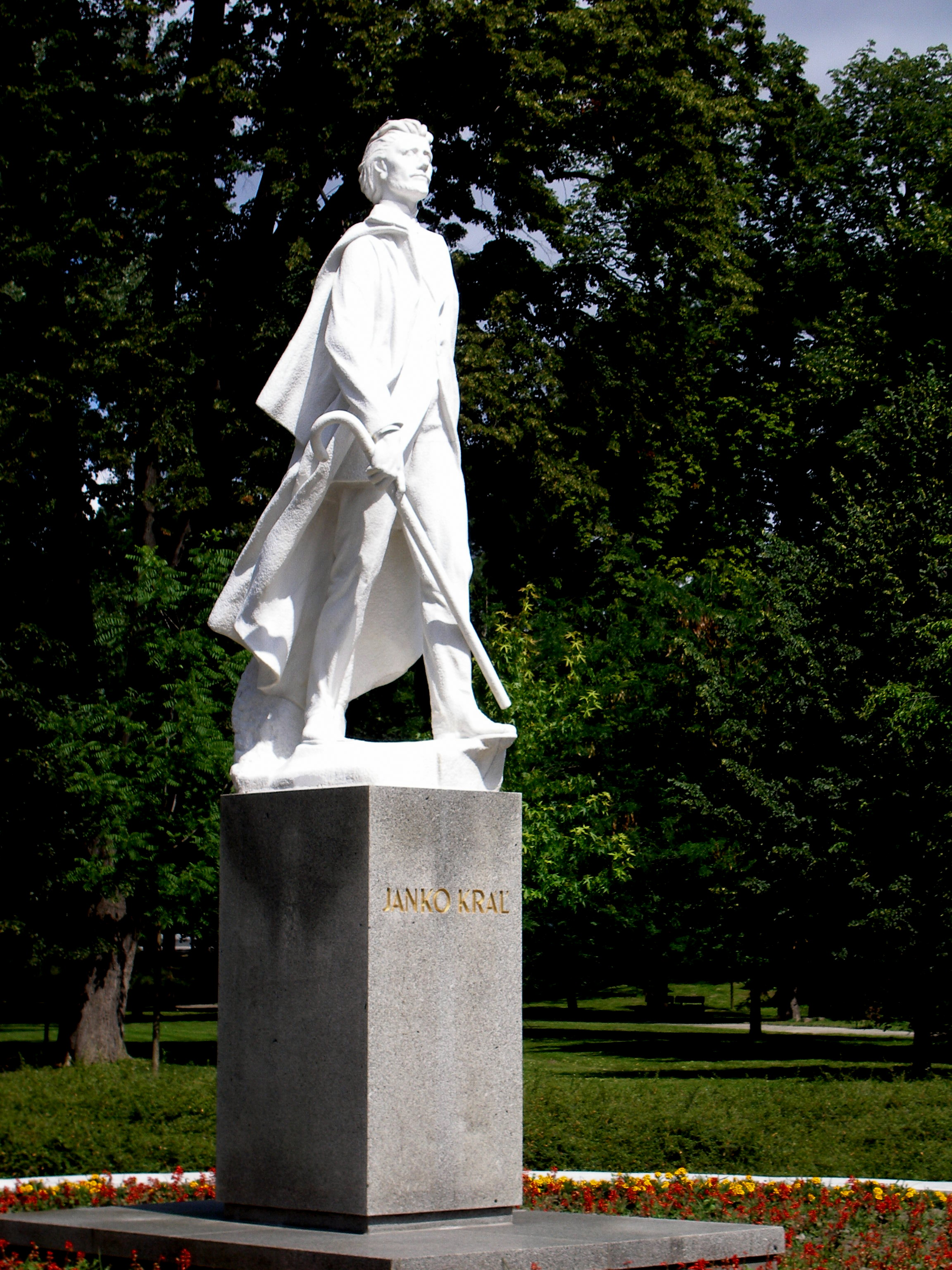 Sad Janka Kráľa v Bratislave, časť Petržalka. Socha slovenského básnika Janka Kráľa po reštaurovaní v roku 2009. Socha bola postavená v roku 1964. Autori: akadem. sochár F.Gibala a architekt Š.Imrich. This medium shows the protected monument with the number 105-321/2 in the Slovak Republic.